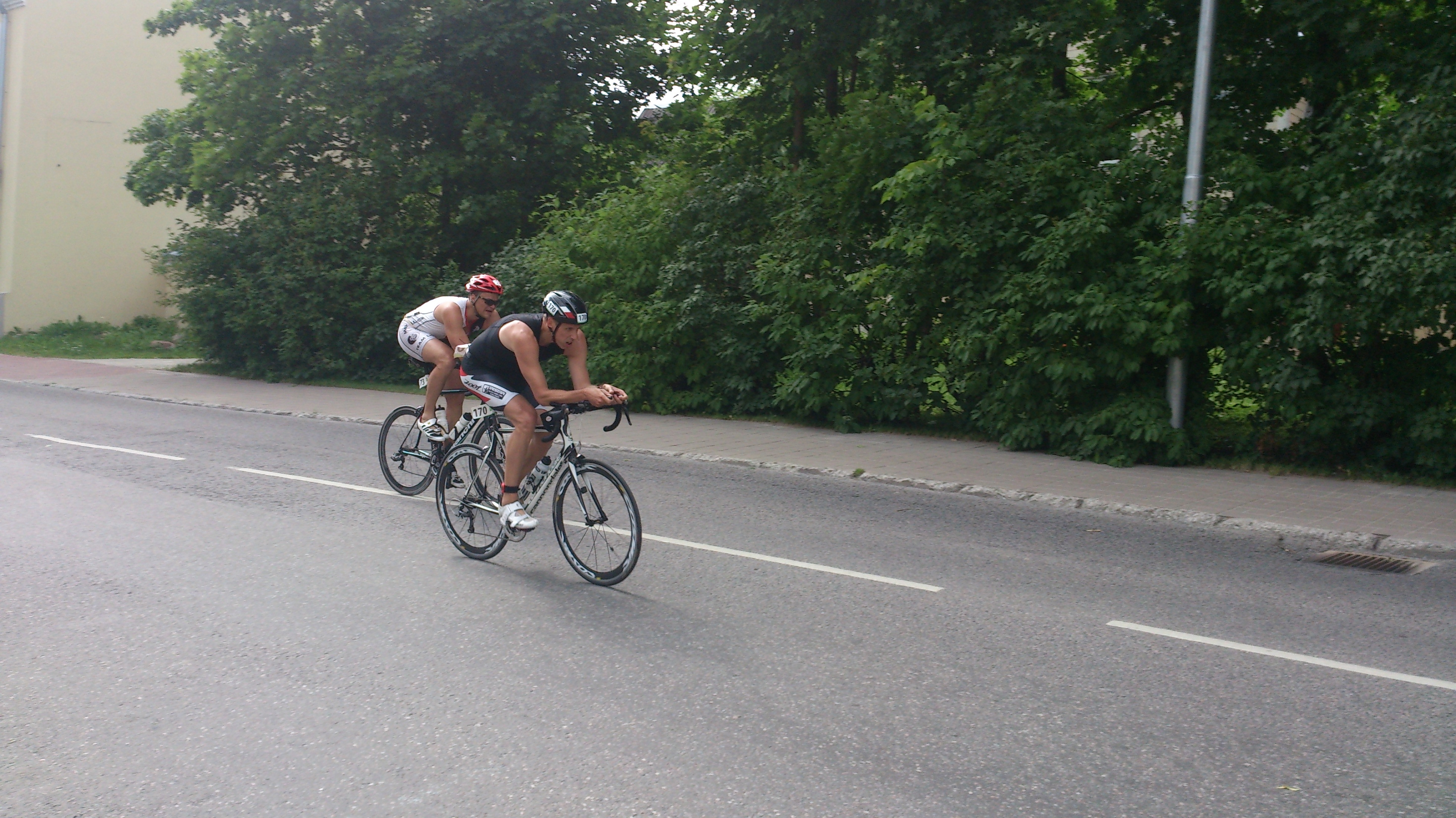 Peeter Ilmas (Nr. 170)[1] ja Erik Pallase (Nr. 73)[1] sõitmas jalgrattaga Laial tänaval Tartu Mill Triathlonil 2014.a. Hansapäevadel